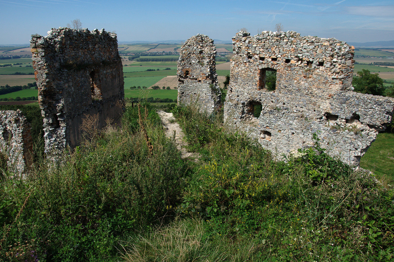 zrúcanina Hradu Oponice